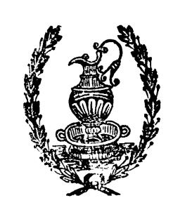 לוגו דפוס צוקרמן